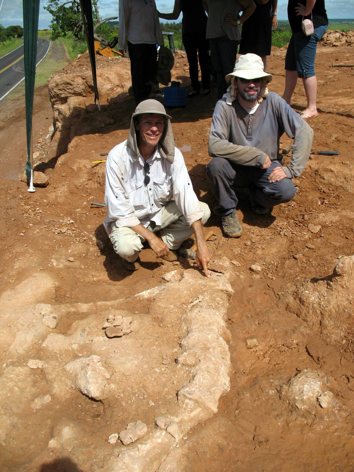 Sítio paleontológico do fóssil de titanossauro descoberto pelo pesquisador e coordenador do Museu de Paleontologia de Marília William Nava em 2009. O fóssil é um dos mais completos deste espécime já encontrados no Brasil.